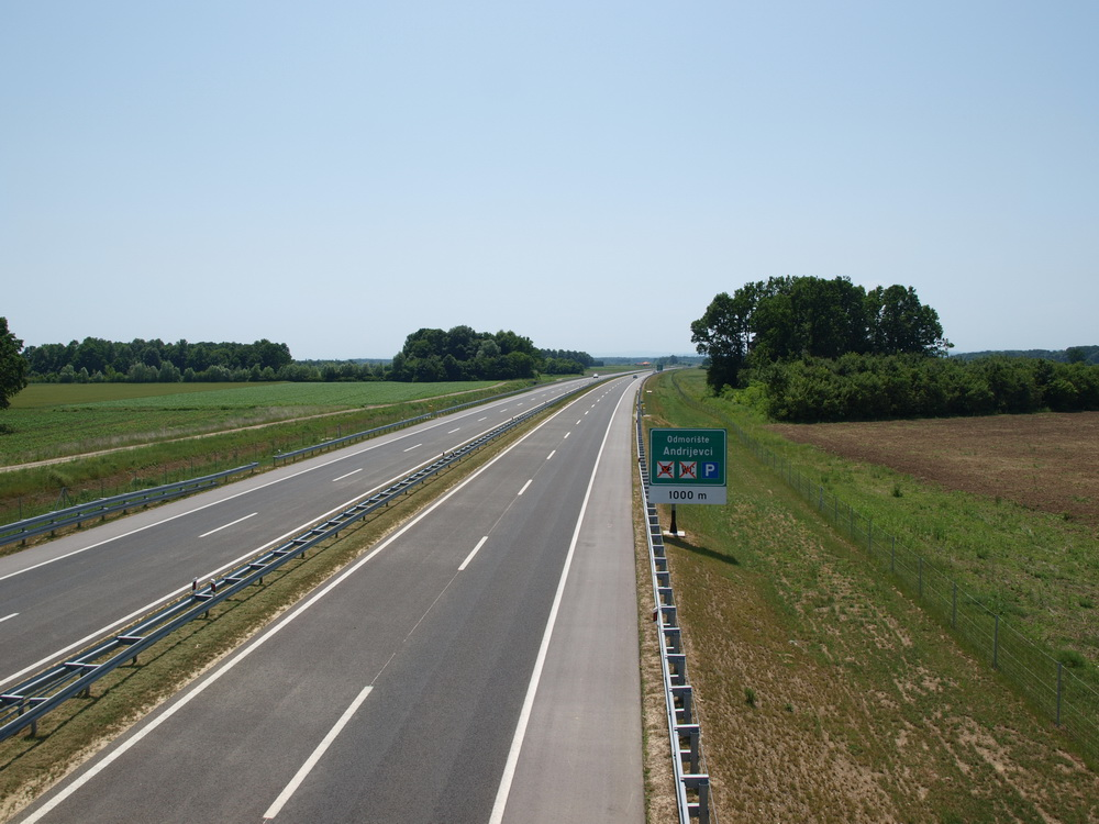 Autocesta A5 (Slavonika), kod Donjih Andrijevaca, Brodsko-posavska županija.